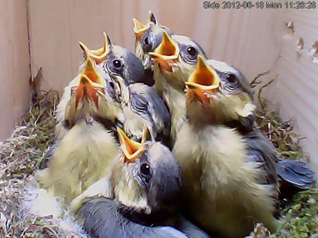 Yngste 13 dager, eldste 16 dager.